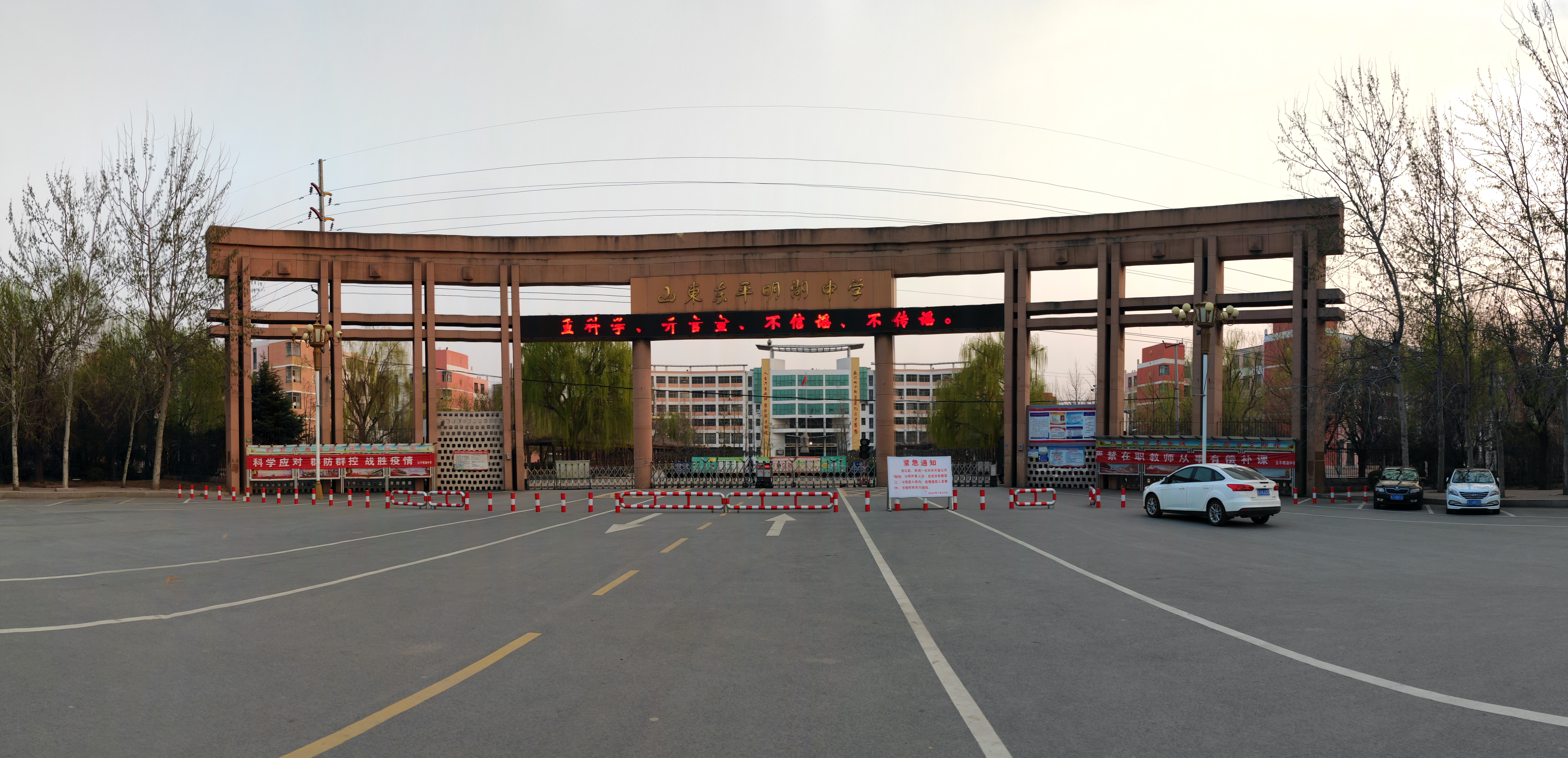 中文（中国大陆）: 东平明湖中学，一所位于山东省东平县东平街道的完全中学，图为其北门的全景图，摄于2020年3月